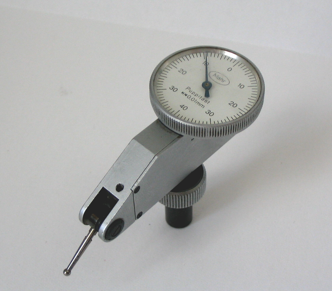 Dial Gauge Puppitast / Messuhr Puppitast